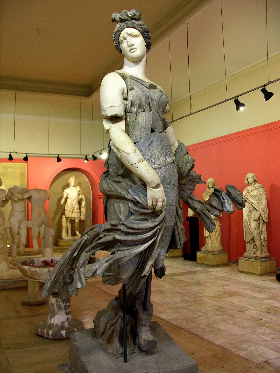 Turkey-2551